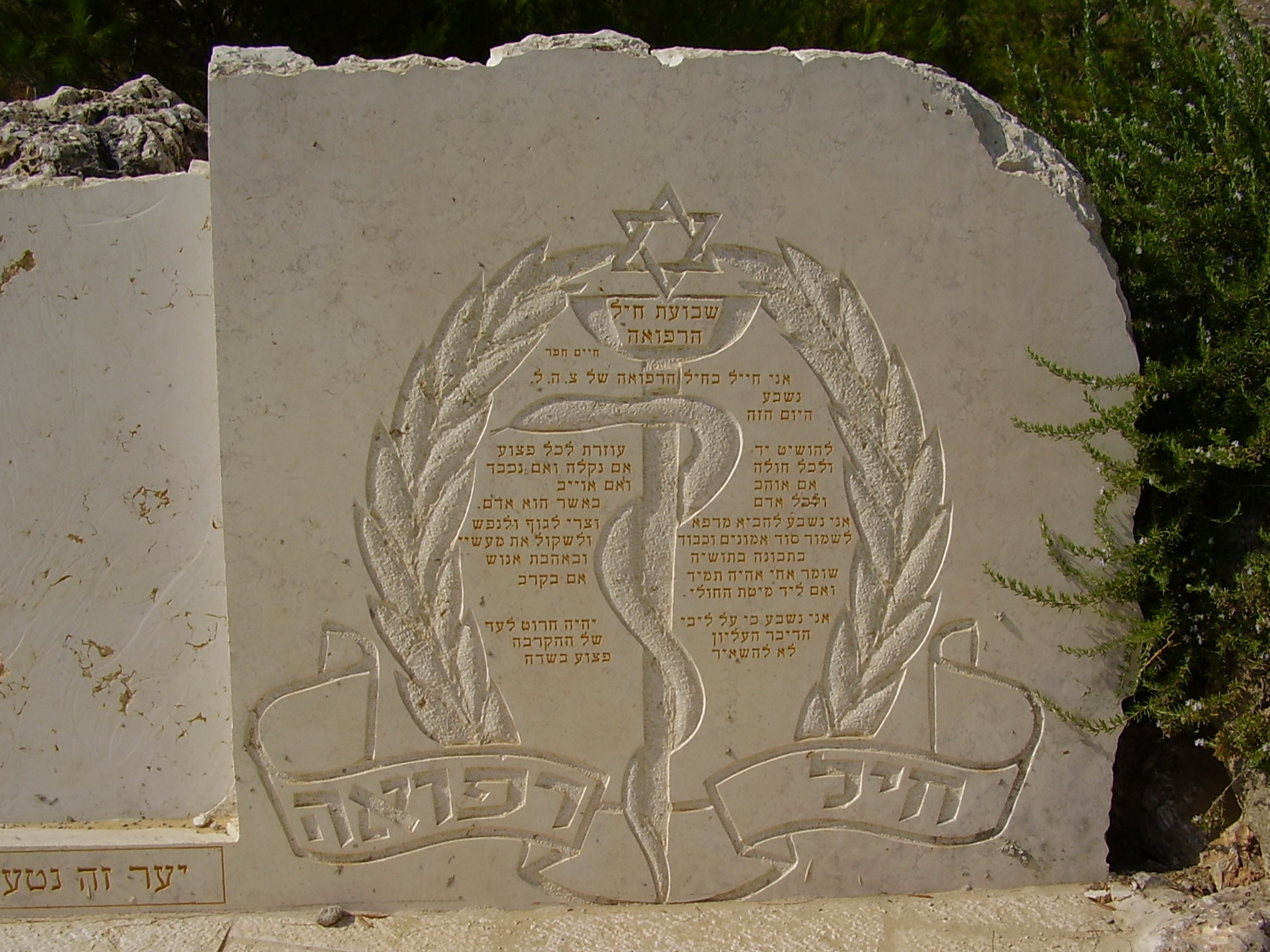 אנדרטת חיל הרפואה ביער מודיעין